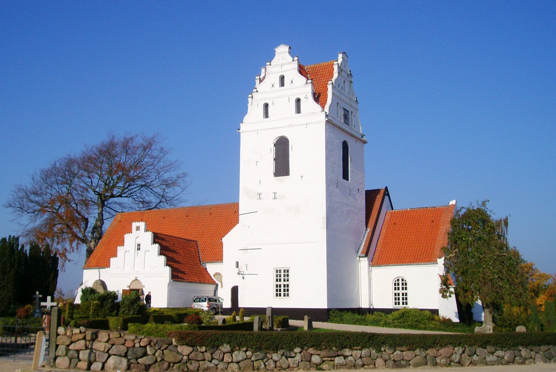 Ringe Kirke, Ringe Sogn, Ringe Provsti, Fyns Stift.